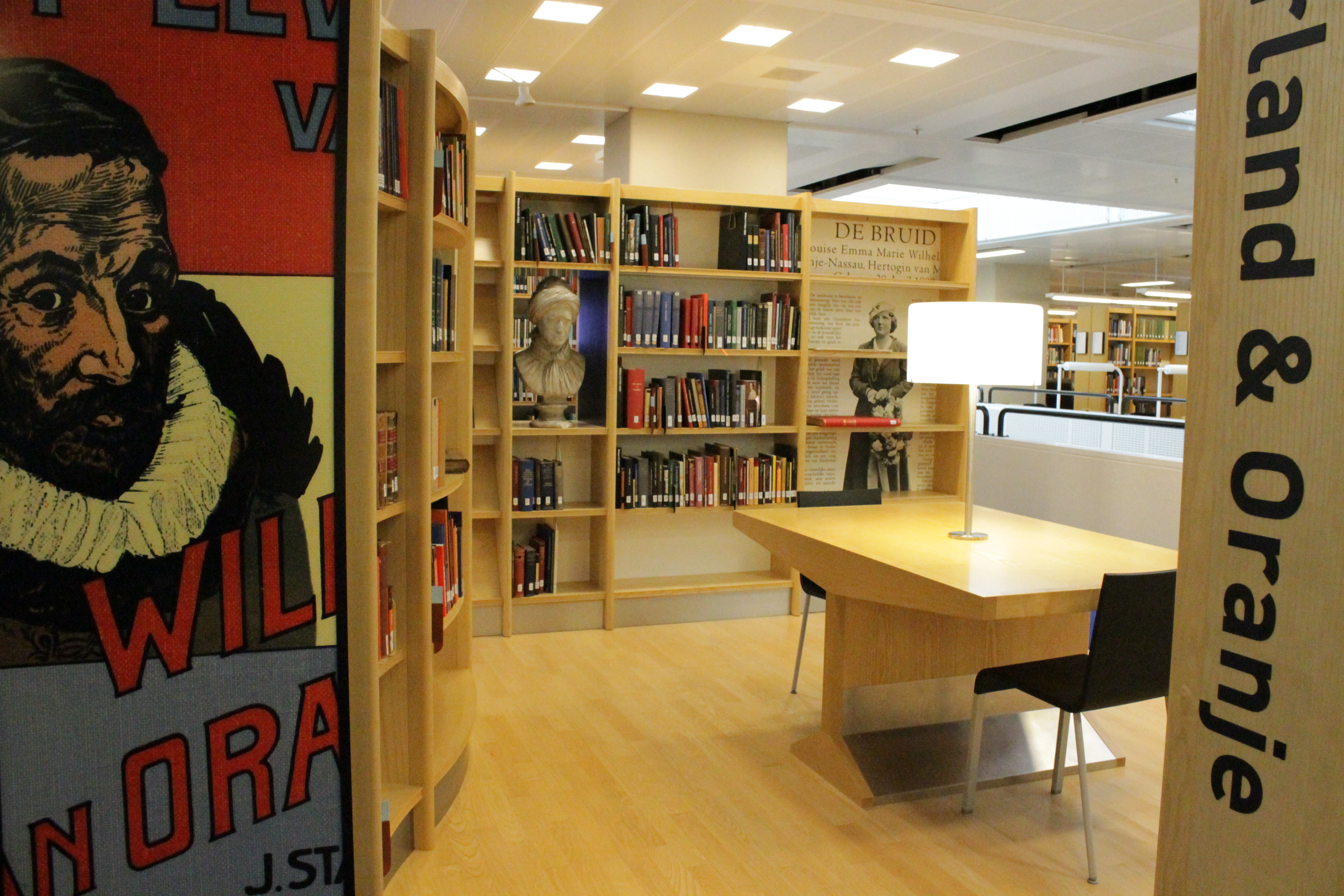 Biblioteca Nacional de los Países Bajos